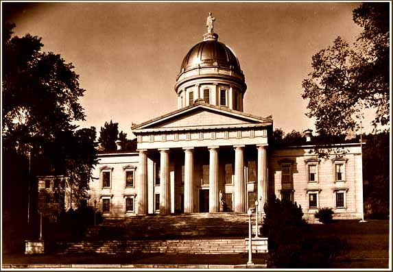 Vermont State Capitol, Montpelier Documentation compiled after 1933